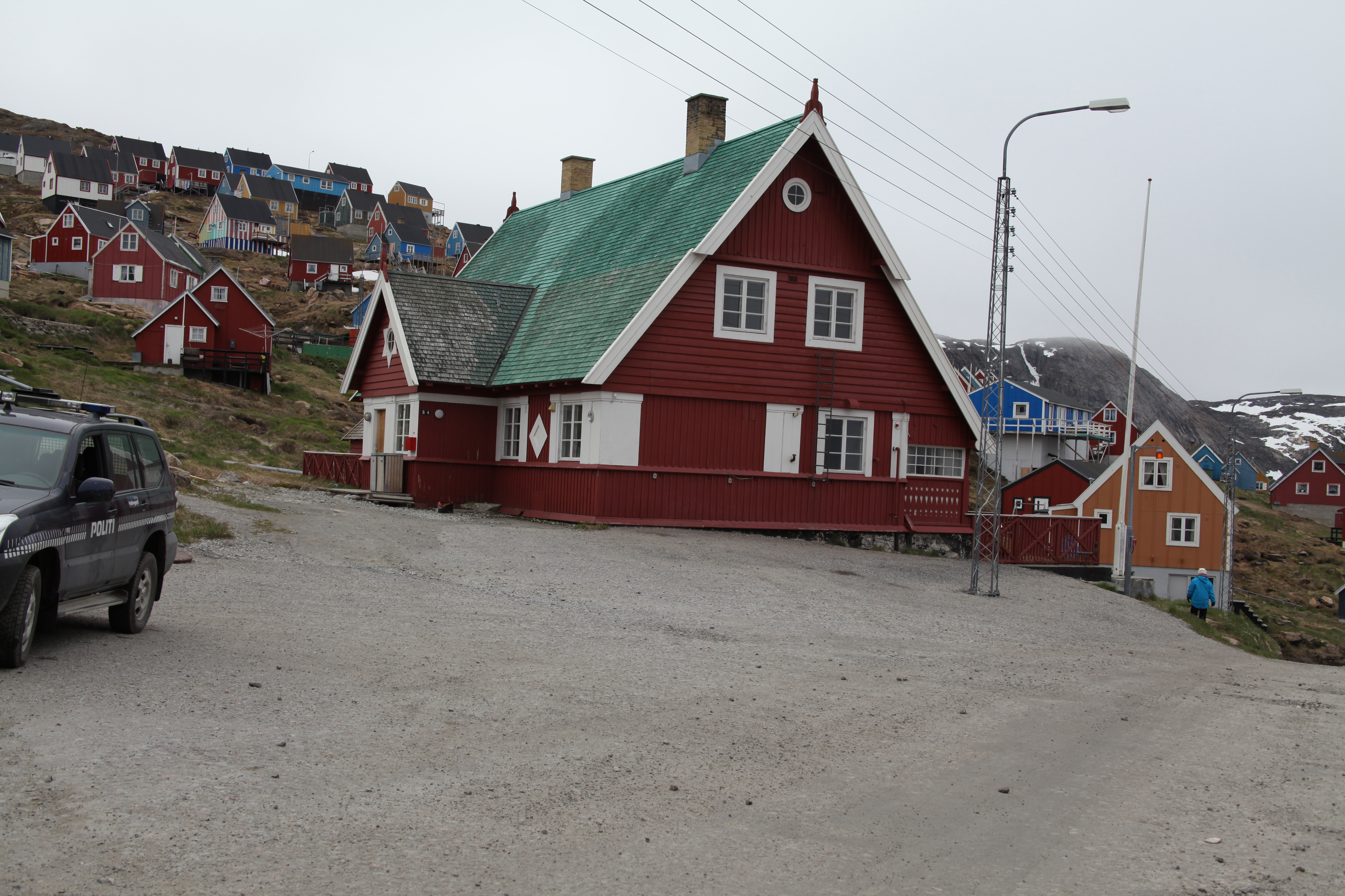 Upernavik